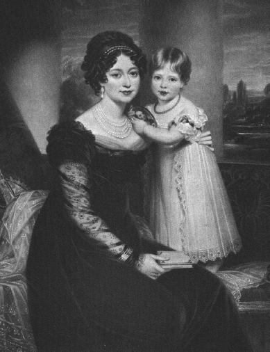 Vitória de Saxe-Coburgo-Saalfeld (mais tarde Duquesa de Kent) (1786-1861) e sua filha, a futura rainha Vitória do Reino Unido (1819-1901).